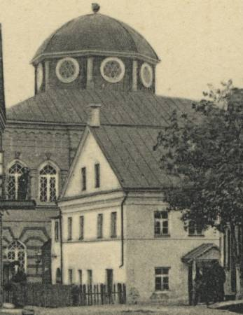 Сінагога 1893 годзе на пярэднім плане, ззаду Галоўная сінагога